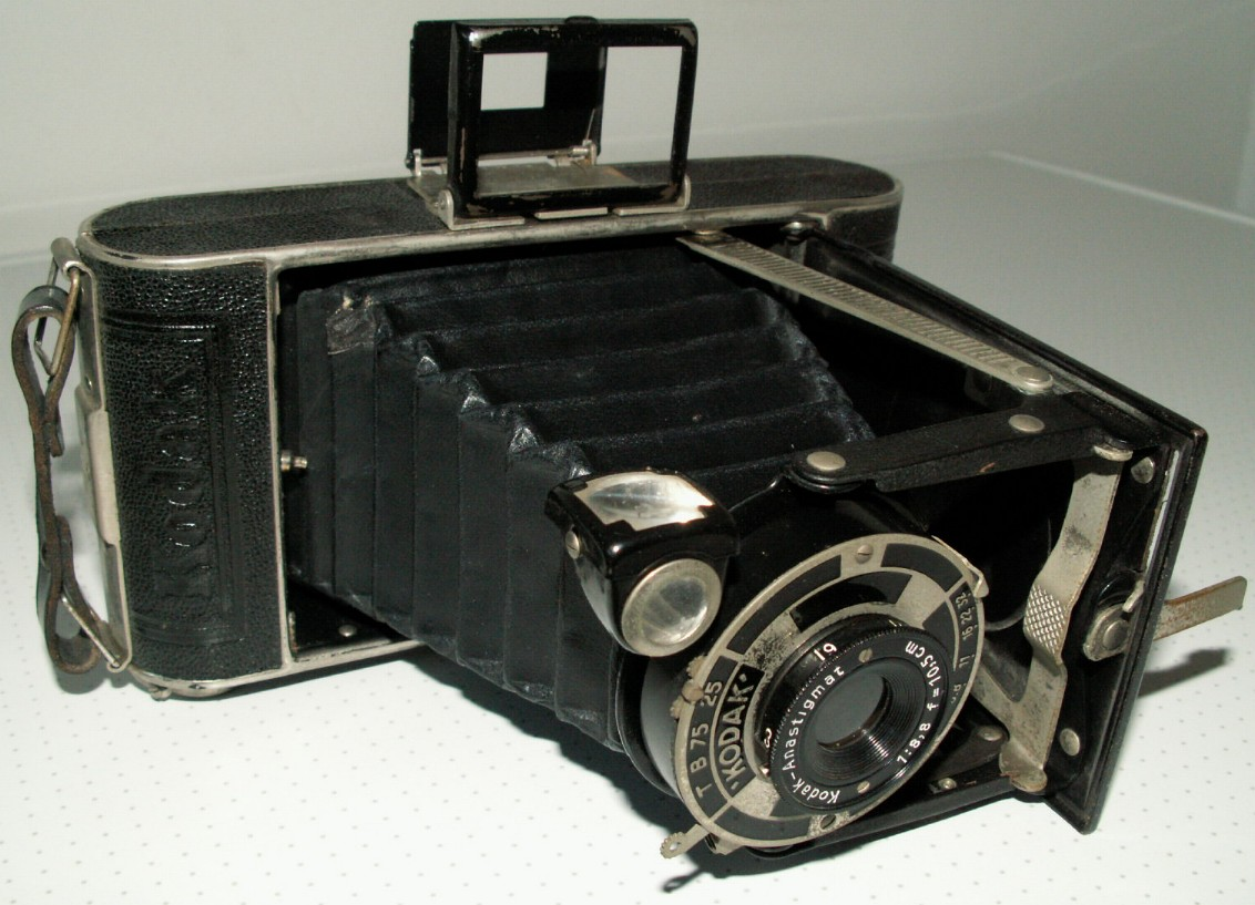 Summary Quelle: selbst fotografiert, 01/2006 Fotograf: Späth Chr. Lizenzstatus: Licensing